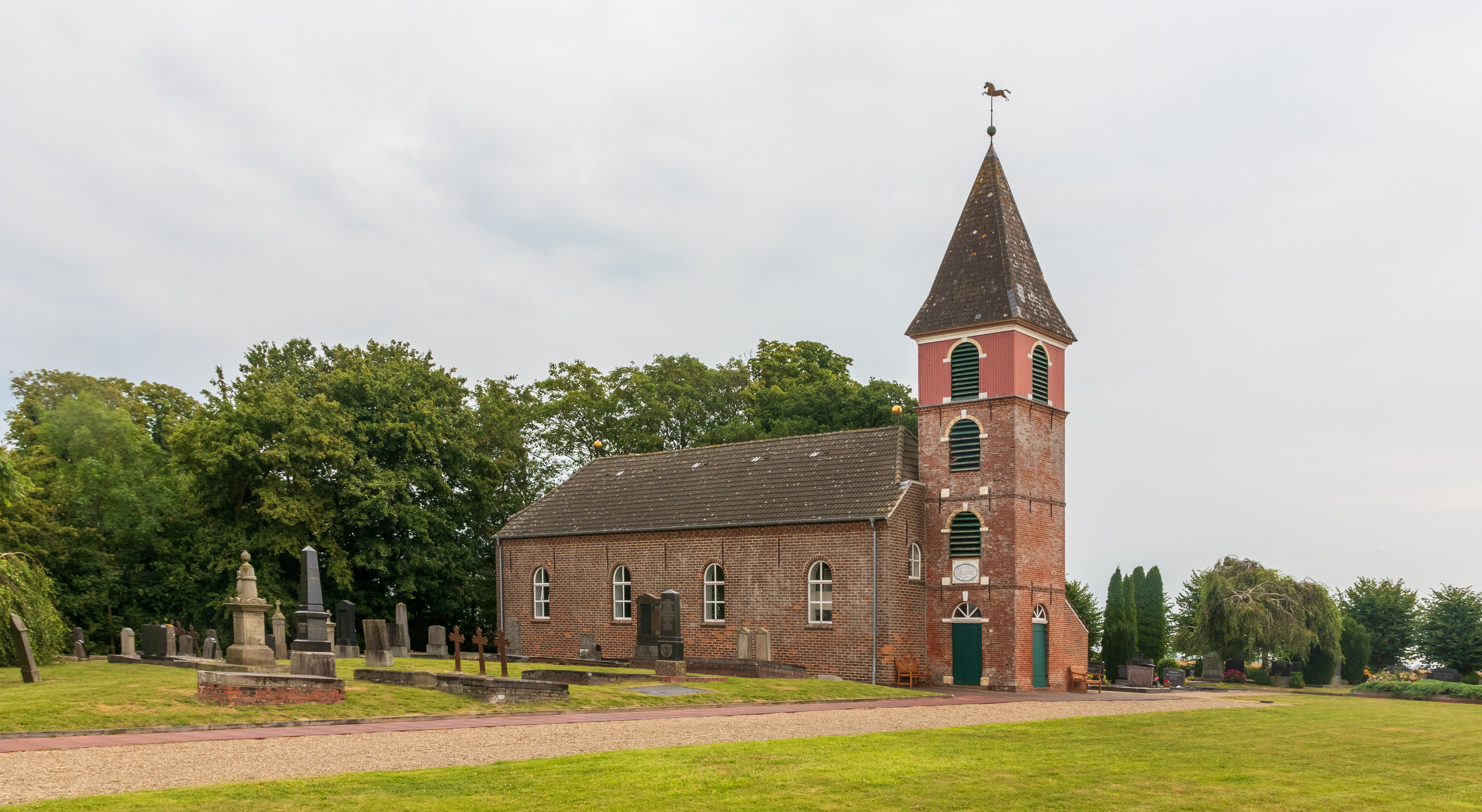 Landschaftspolder Kirche